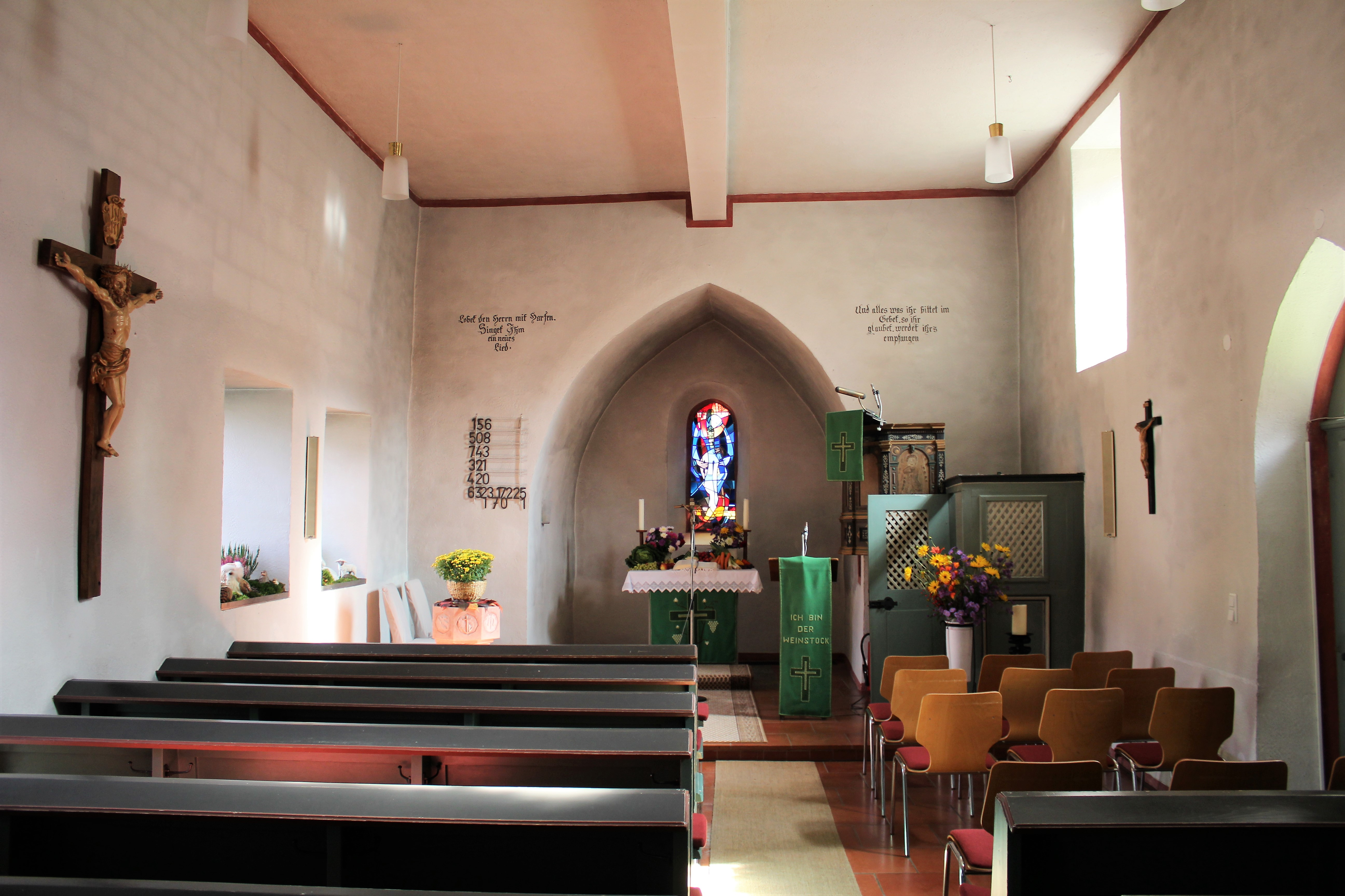 Evanglische Kirche Weipoltshausen, Gemeinde Lohra, Landkreis Marburg-Biedenkopf, Hessen, Deutschland